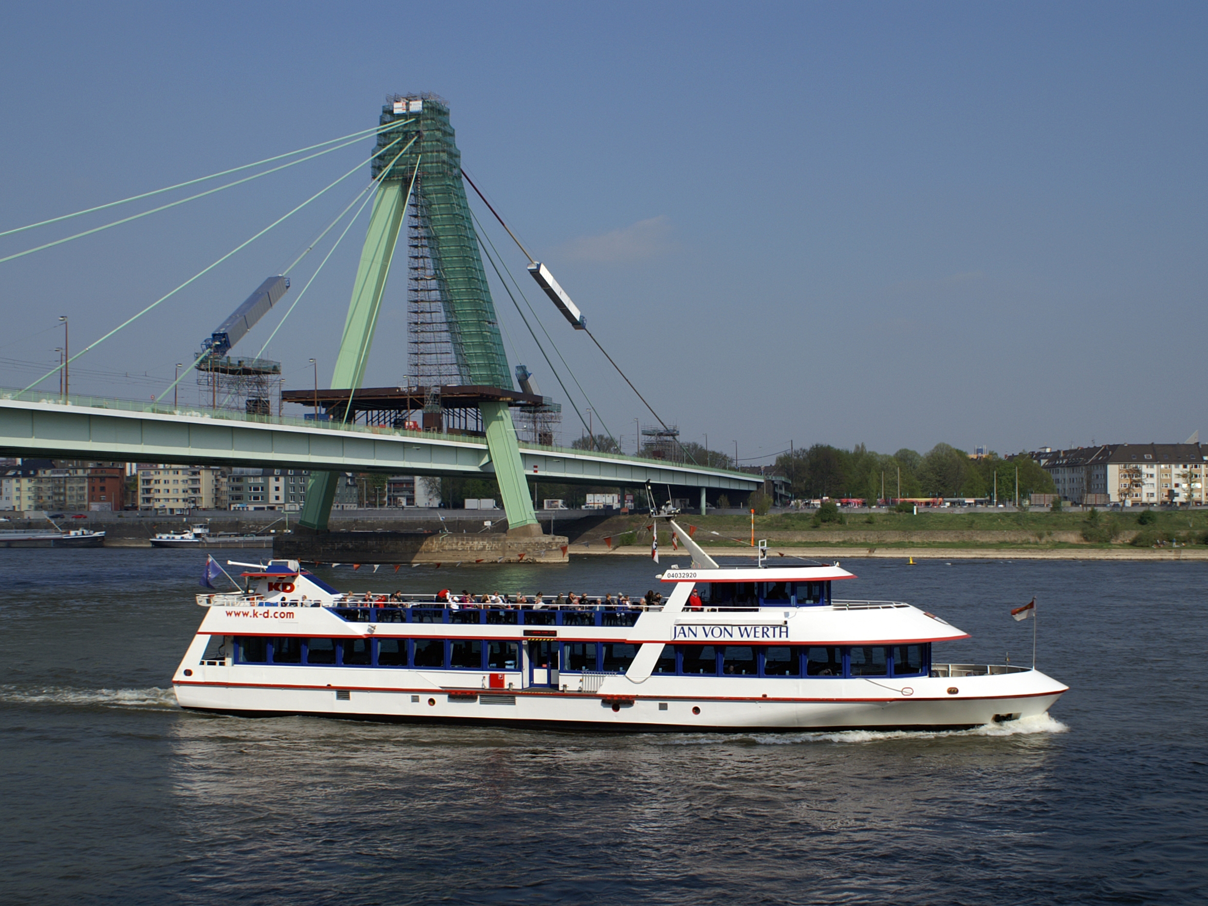 Rundfahrtschiff Jan von Werth von der Köln-Düsseldorfer auf Fahrt in Höhe der Severinsbrücke in Köln.